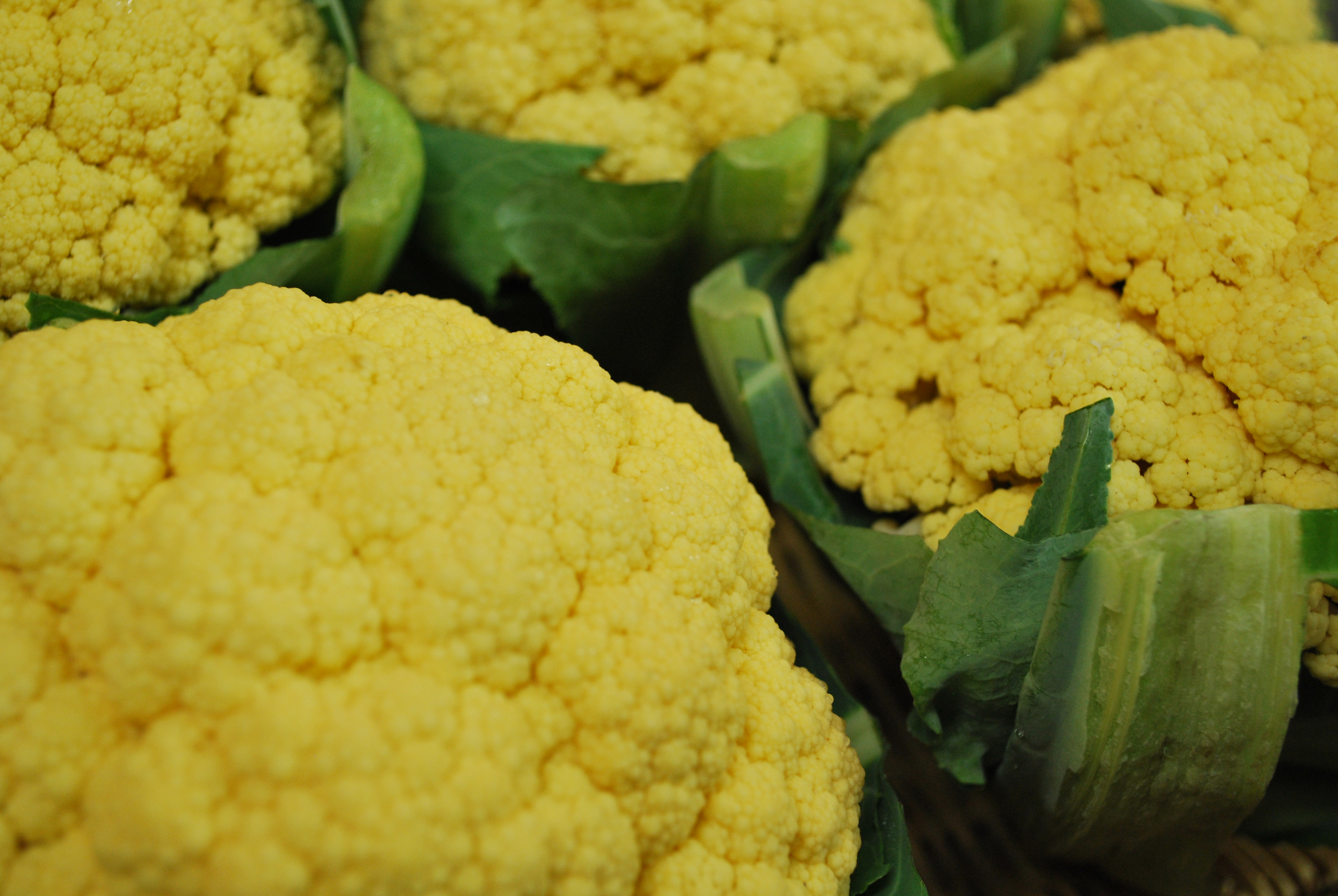 愛媛県ナイスベジタブルファームさんのカリフラワーです。 TRATTORIA MARCOにて撮影。